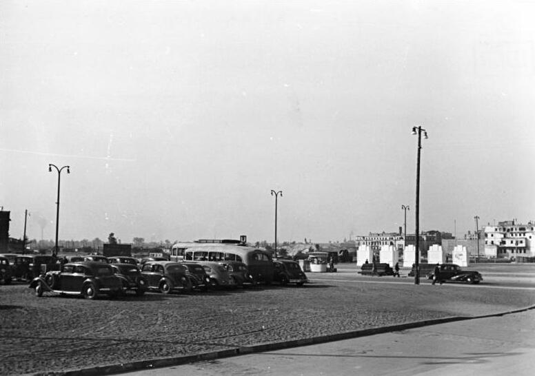 Berlin, Thälmannplatz, Parkplatz Illus Schmidtke 4.10.1951 Berlin 1951 UBz: Blick auf den Thälmannplatz.